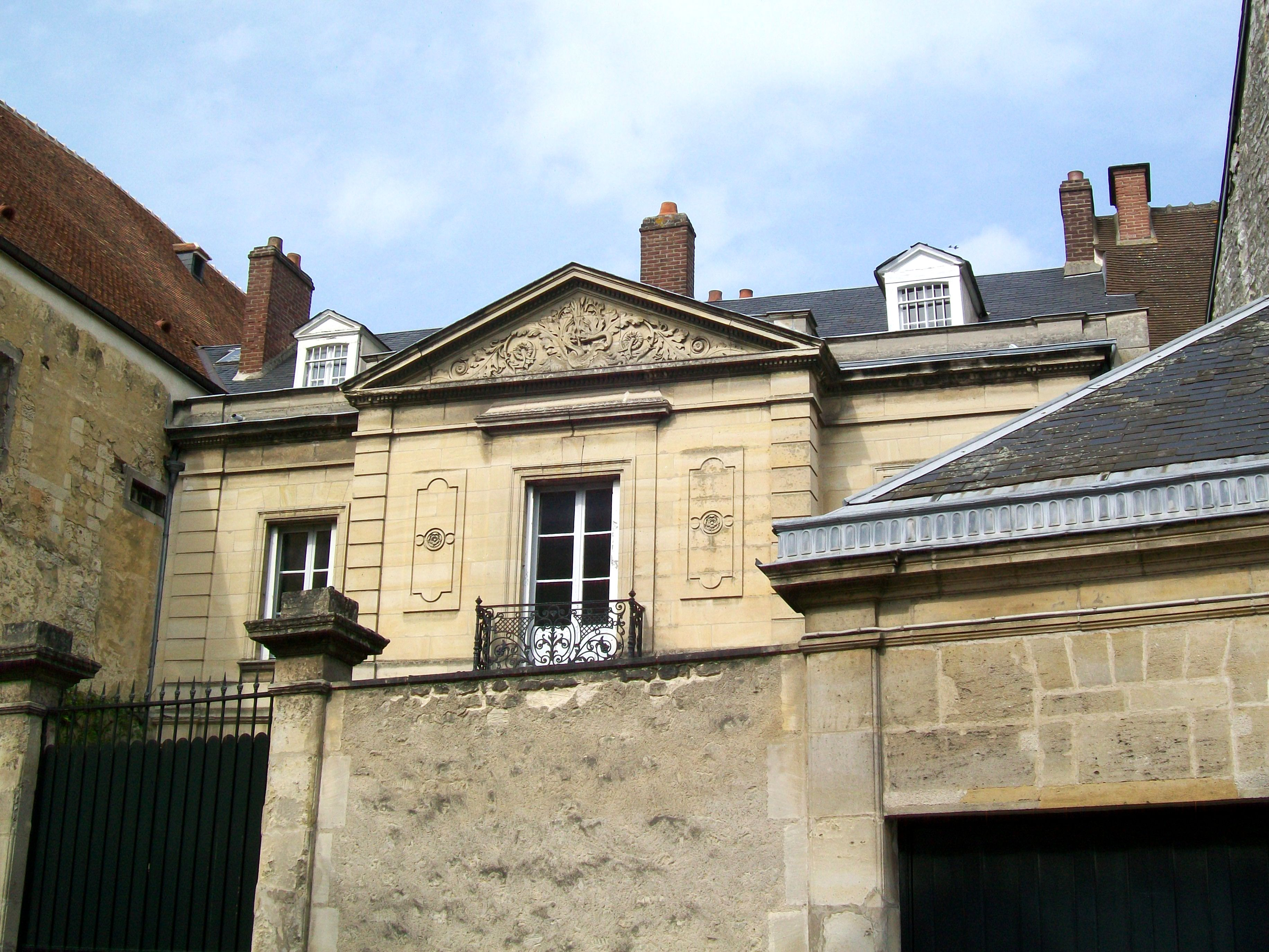 Façade sud de l'ancien évêche, surmonté d'un fronton triangulaire : aspect méconnu du monument. Rue du chancelier Guérin.